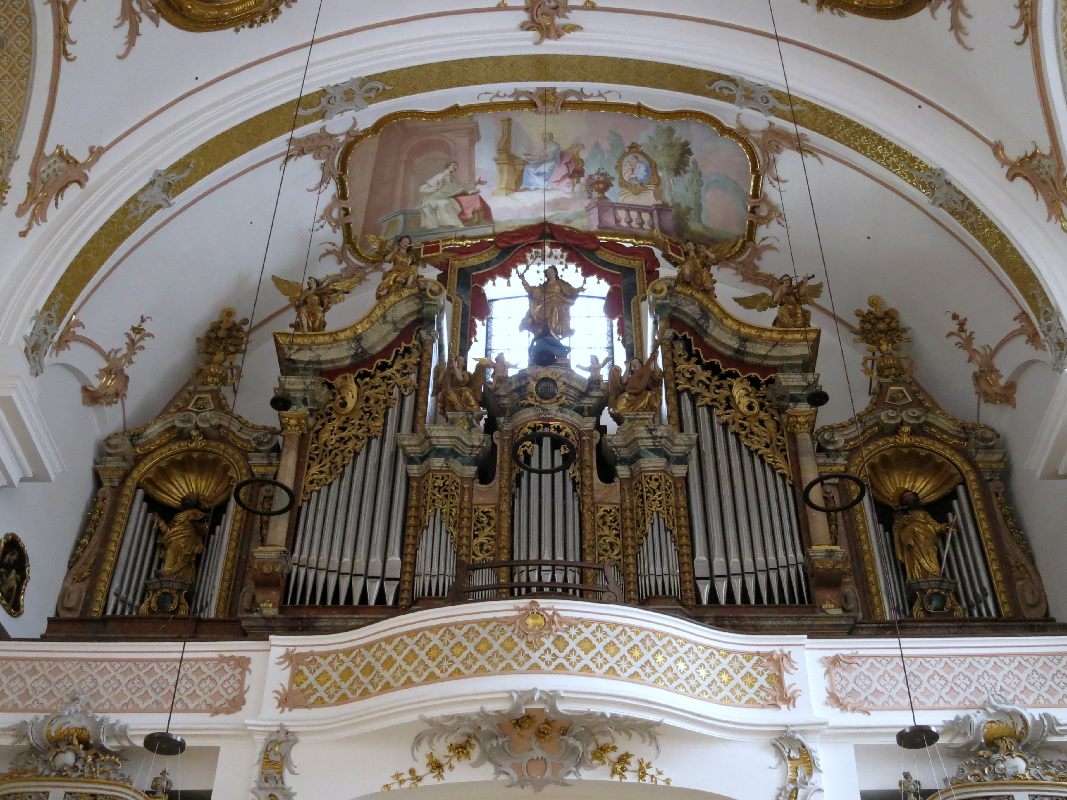 Orgelempore mit Orgel